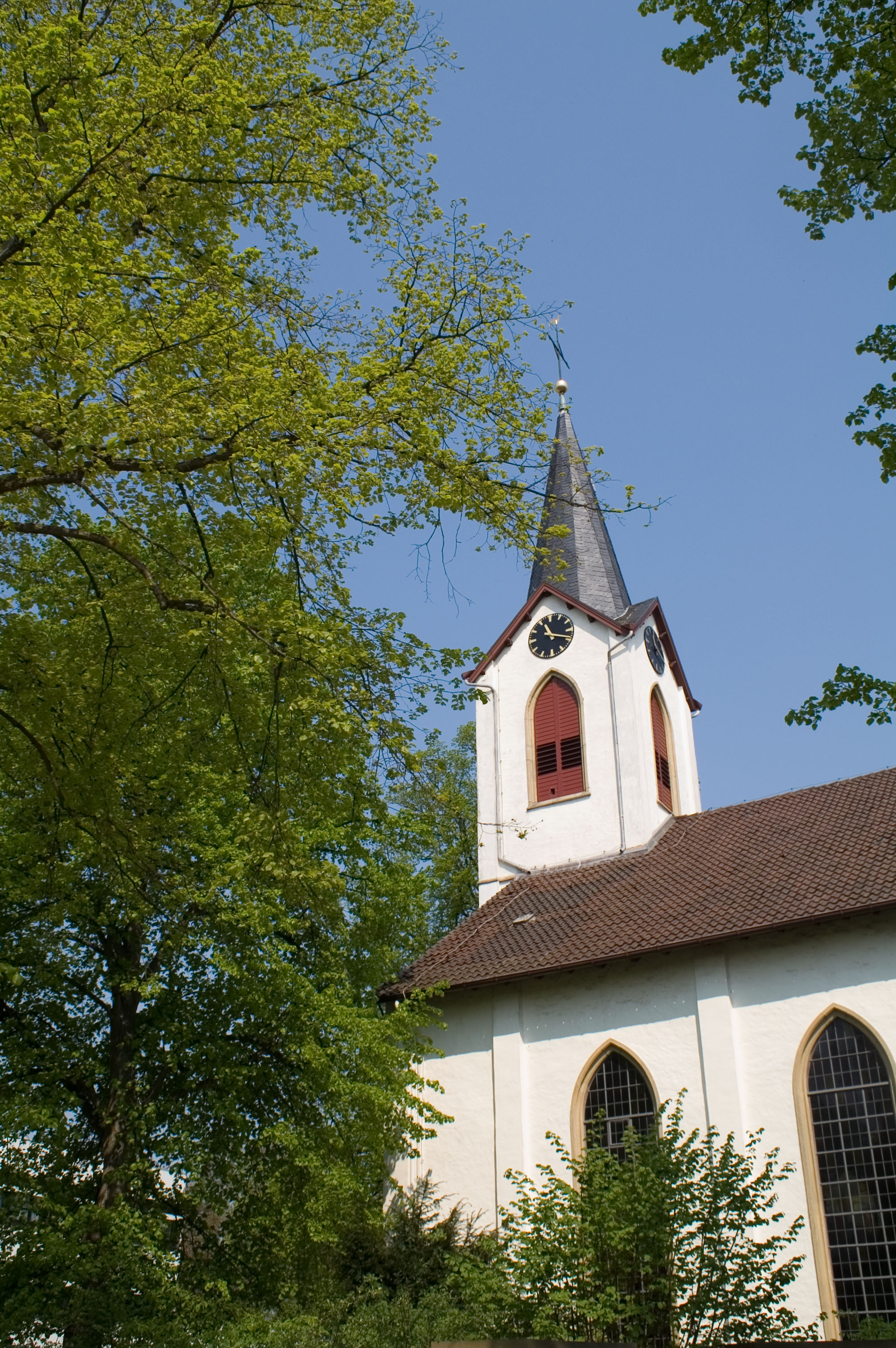 Turm der evangelisch-reformierten Kirche von Leopoldshöhe. Aufgenommen vom Marktplatz. This is a photograph of an architectural monument.